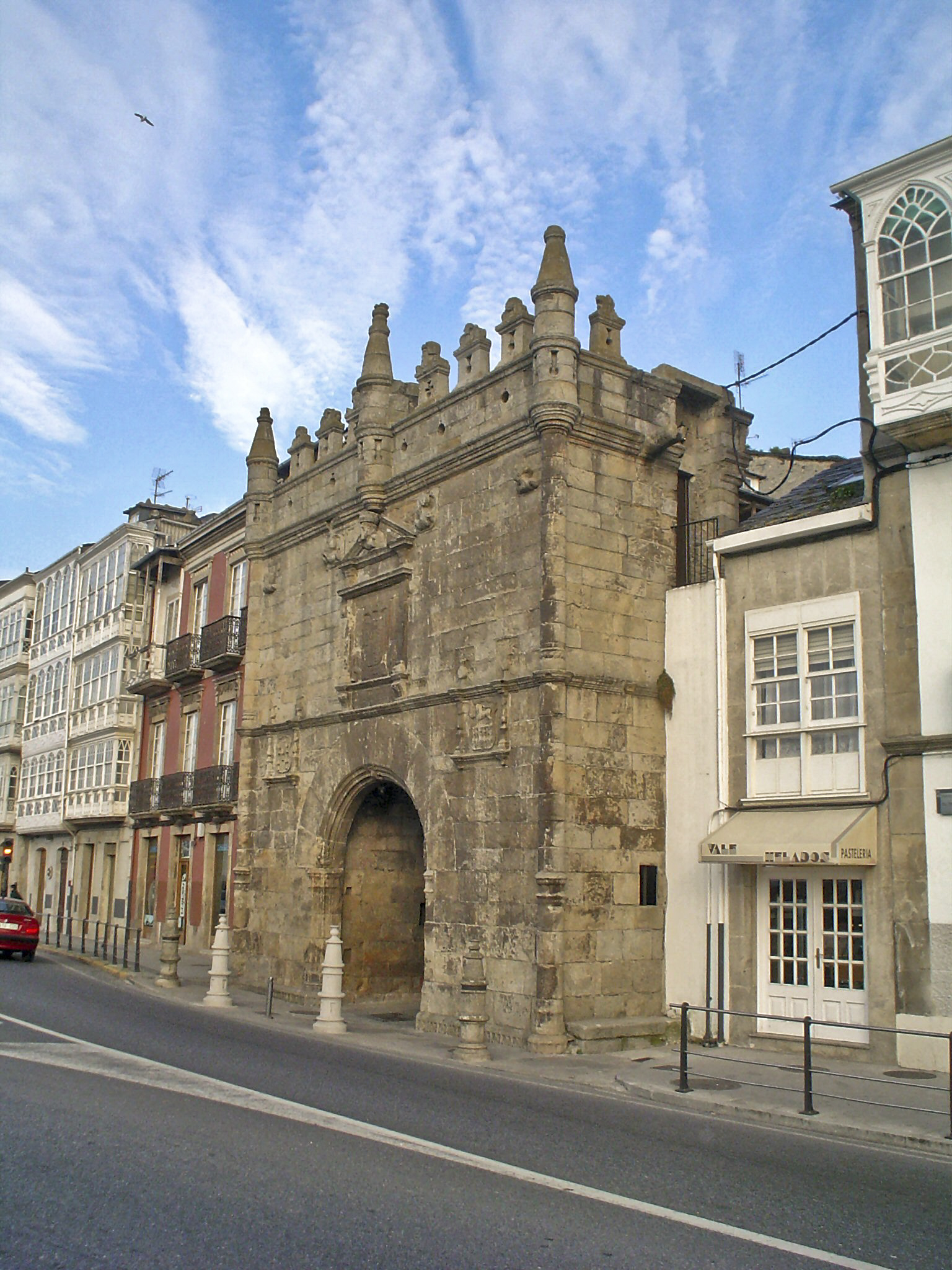 Porta de Carlos V (Viveiro)